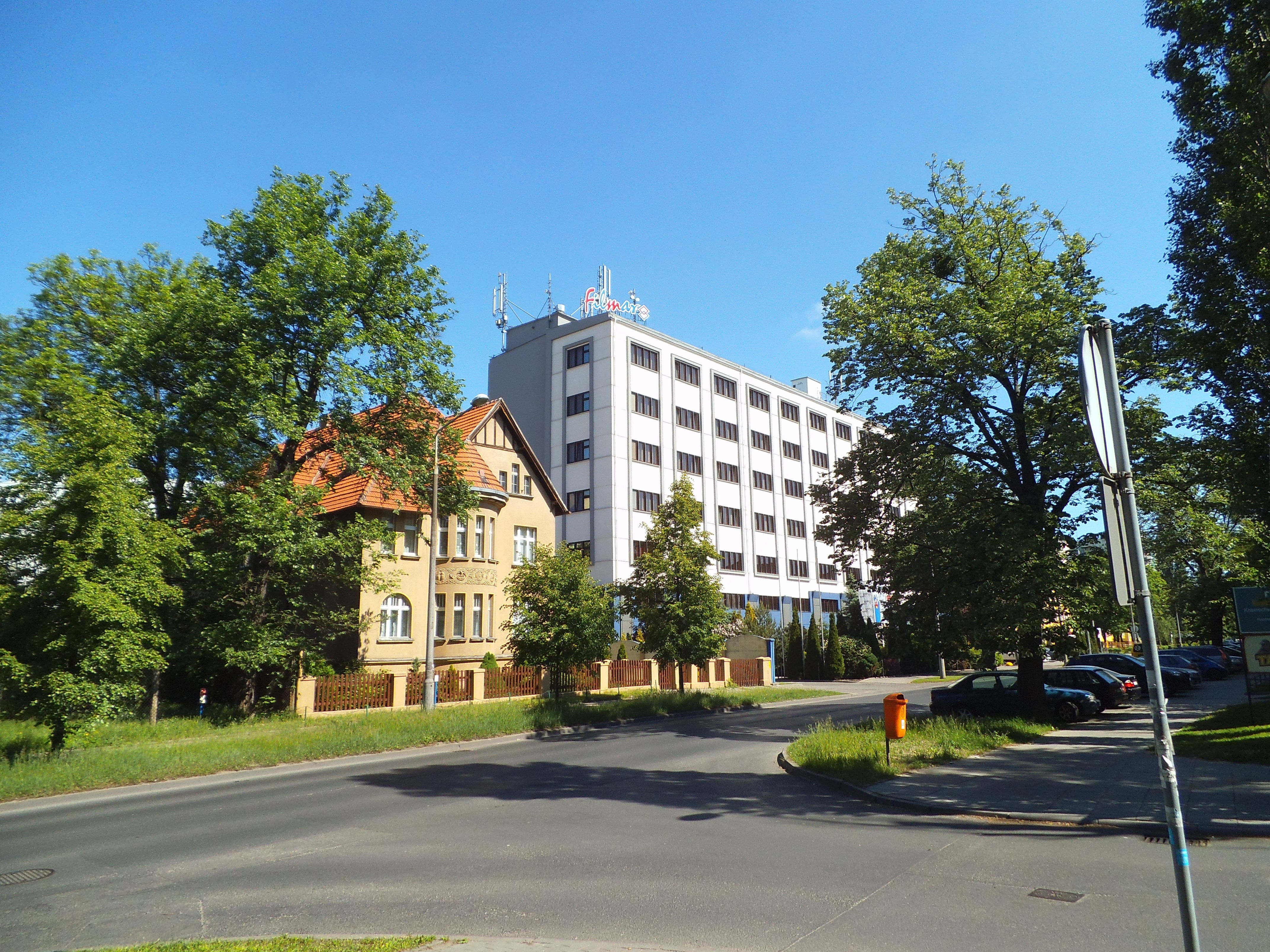 Ulica Grudziądzka w Toruniu4